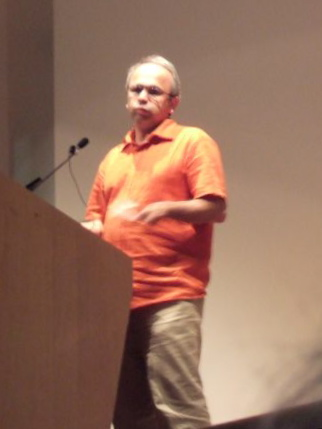 Ebrahim Nabavi